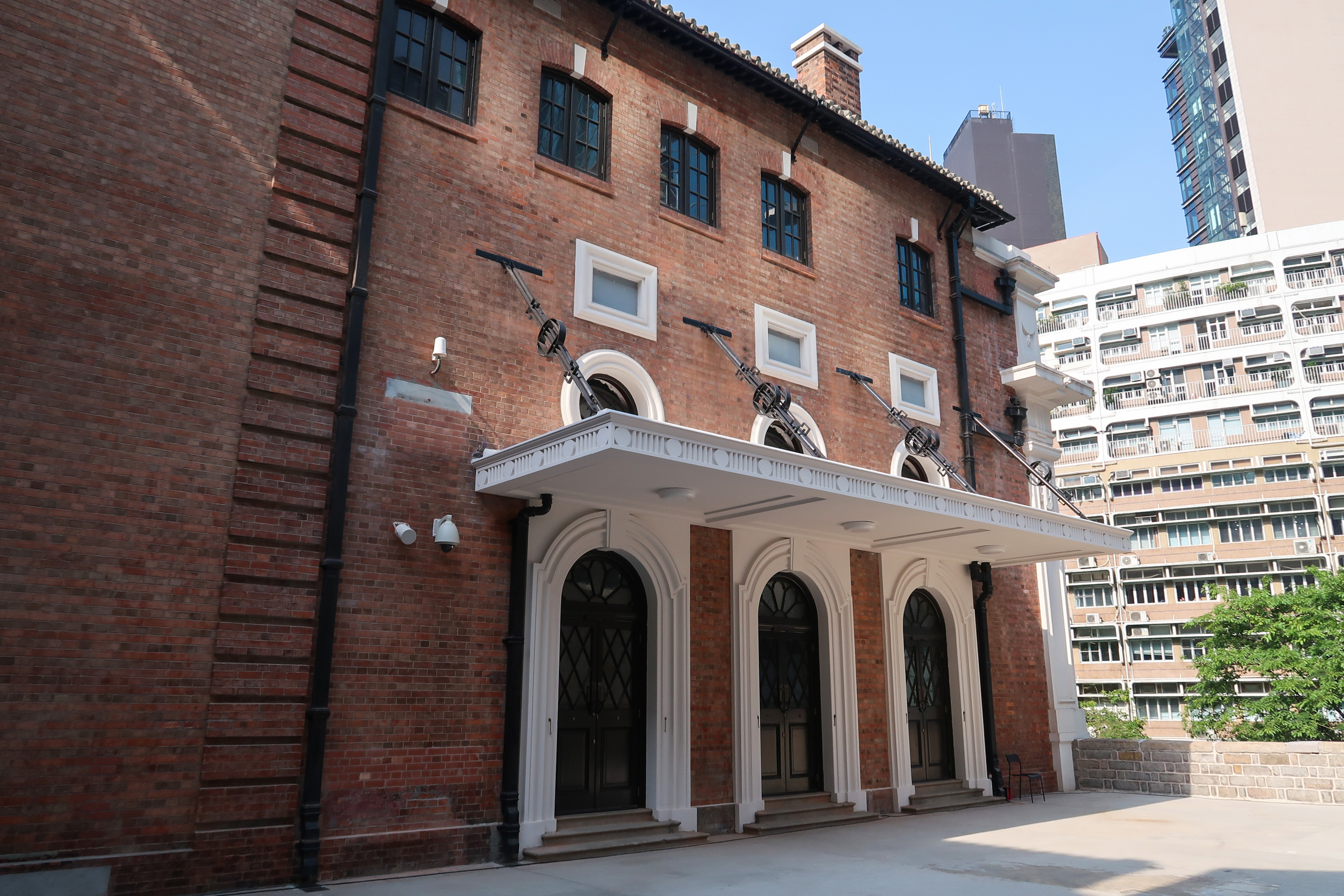 Tai Kwun Central Magistracy